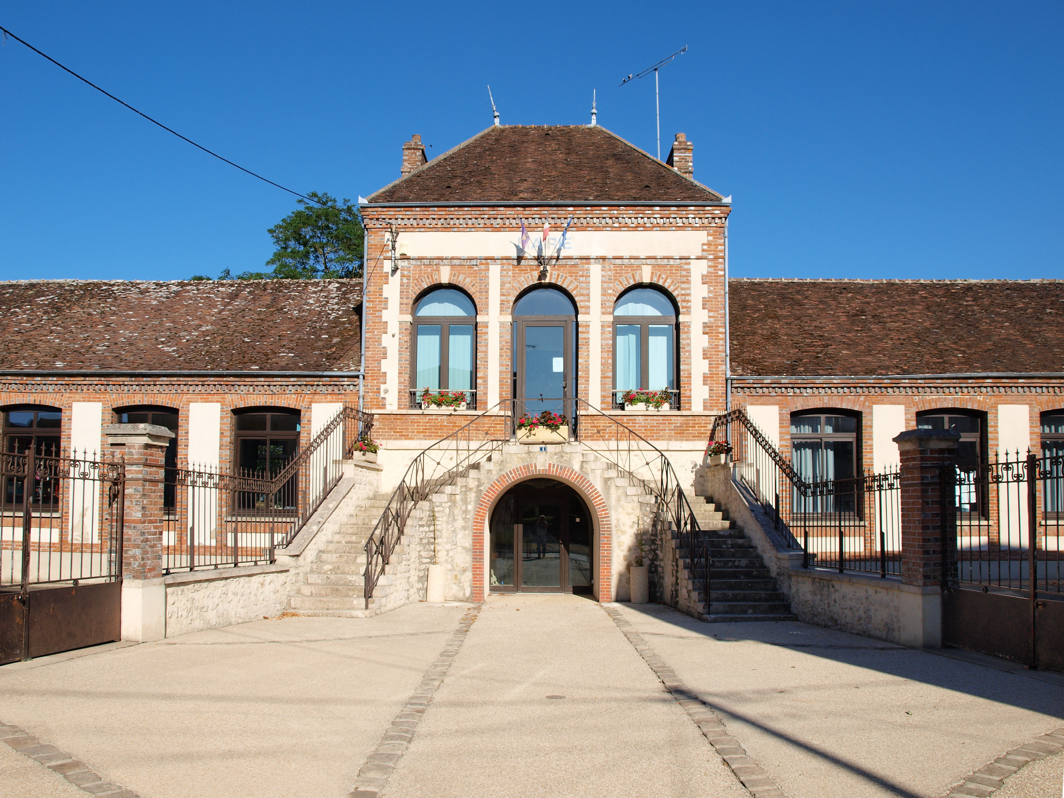 Mairie-école de Villebéon (Seine-et-Marne, France)